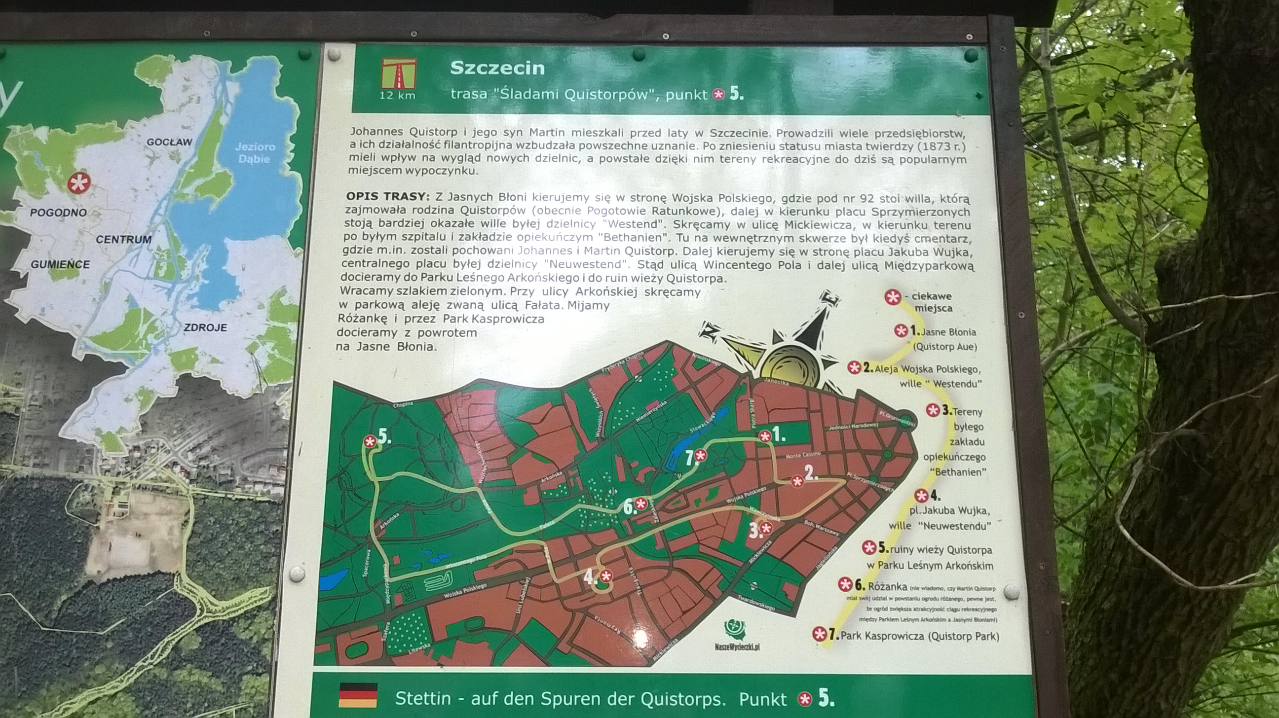 Szlak turystyczny upamiętniający Johannesa Quistorpa i jego syna Martina, których działalność filantropijna obejmowała m.in. utworzenie w Szczecinie terenów rekreacyjnych na obszarze współczesnego Parku Kasprowicza i Parku Leśnego Arkońskiego (fragment tablicy informacyjnej z objaśnieniem 7. węzłowych punktów wycieczki)